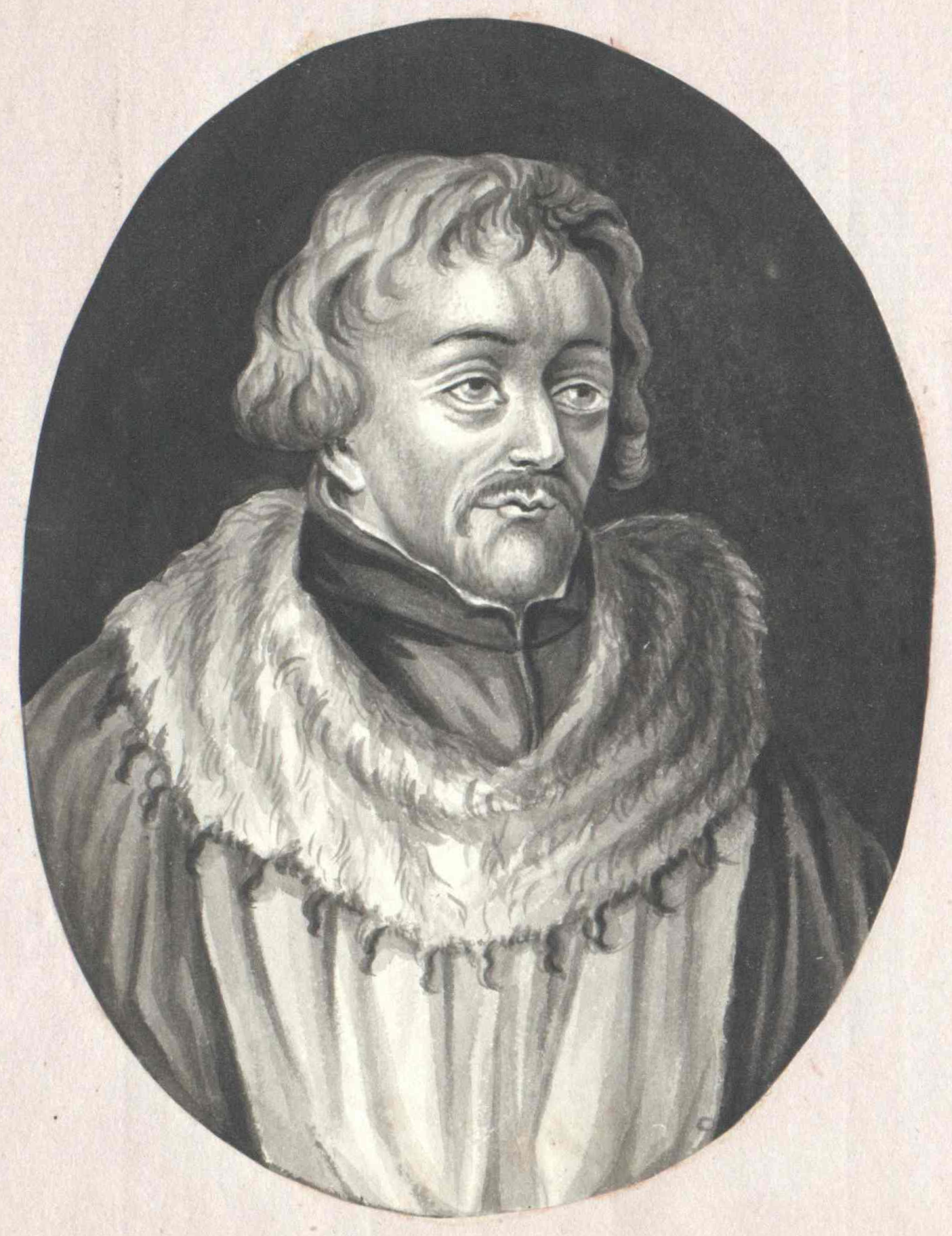 Johannes Rethius, dt. Jesuit Wien, Österreichische Nationalbibliothek, Bildarchiv und Grafiksammlung, Porträtsammlung, Inventar-Nr. PORT_00138011_01